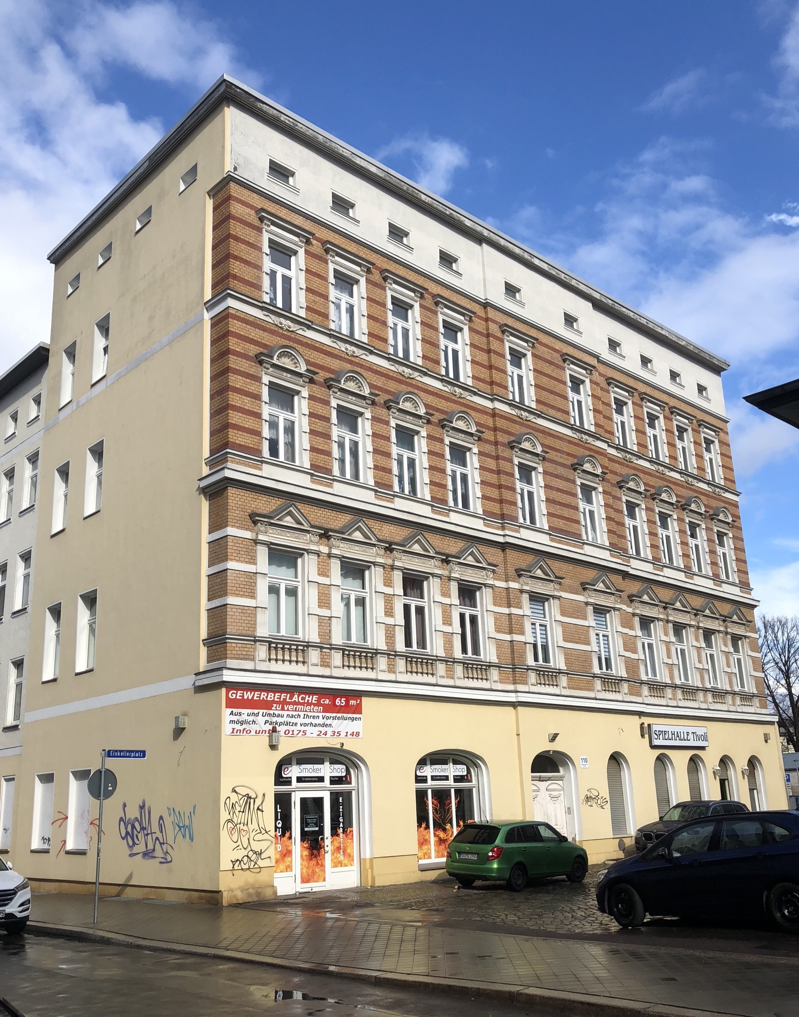 Halberstädter Straße 110 in Magdeburg